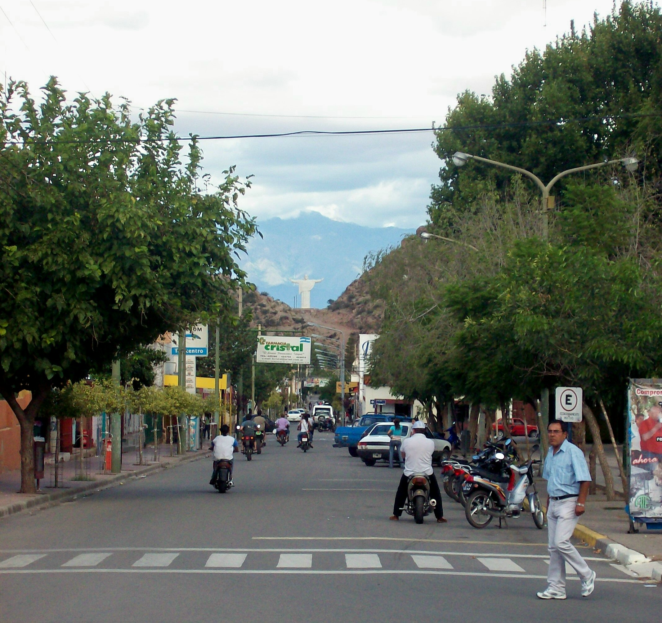 Calle Joaquín V. González, entre las calles "19 de Febrero" y "De Castro y Bazán", en Chilecito, en la provincia argentina de La Rioja. Al fondo se observa el Cristo (en el mirador Portezuelo), a la derecha la vereda de la plaza "Caudillos Federales". La foto está tomada desde la esquina con la calle 19 de Febrero, mirando aproximadamente al Este.